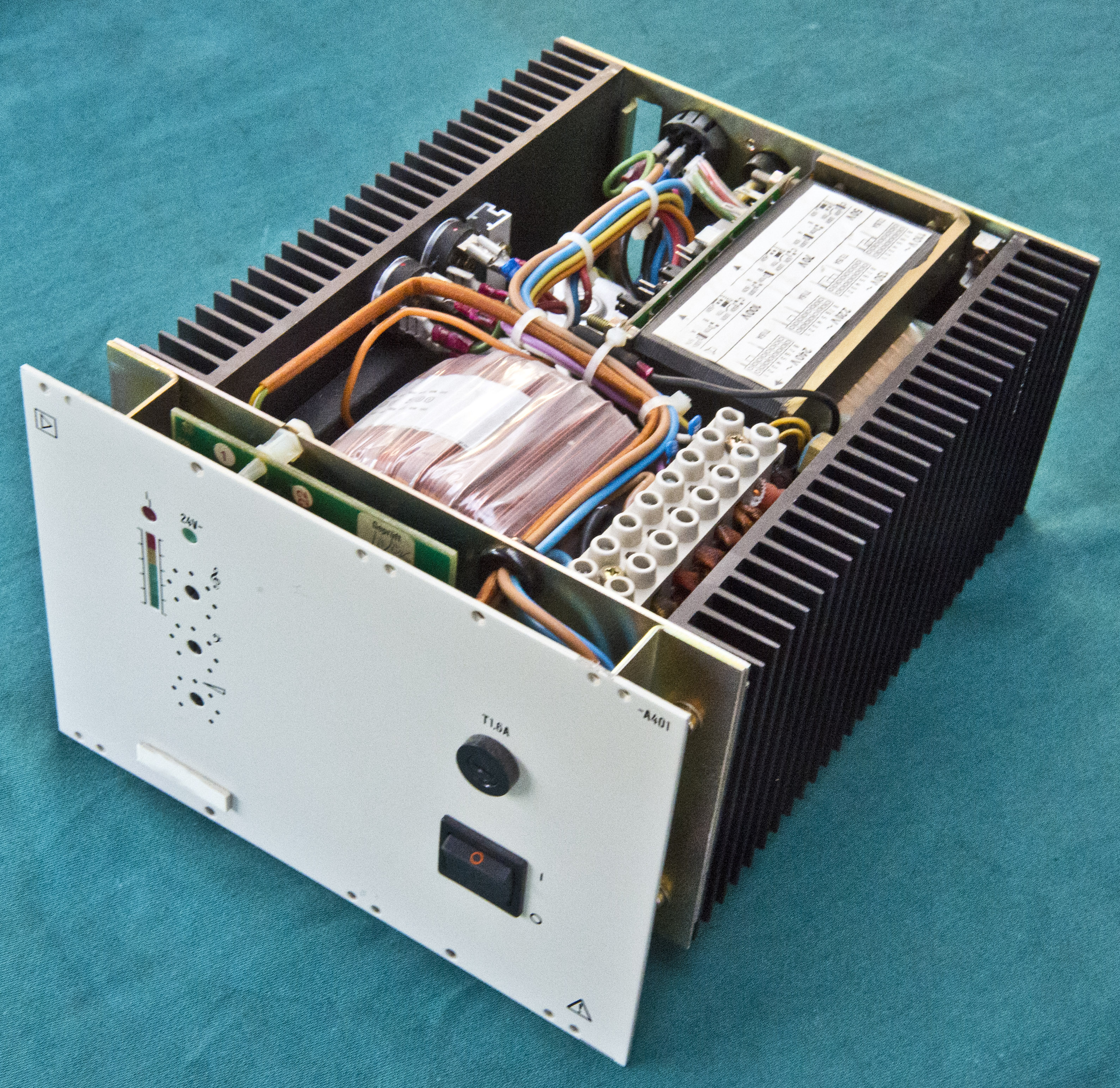 Amplifier A401 monoblock manufactured by Siemens in the mid 198th - Siemens 120 Watt Leistungsverstärker A401 (Typ ELA = Elektroakustik Lautsprecher Anlage) Chassis-Einbaugerät in Metallausführung (Monoblock) mit Ringkerntrafo-Netzteil Abmessungen: BxHxT 183 x 130 x 240 mm, Gewicht: 8 kg Lautstärke und Höhen/Tiefen regelbar über Trimmpoties Eingang zwei DIN-Buchsen, Ausgang: LS7-Lautsprecherausgang 8 Ohm oder 100V für verteilte Lautsprecheranlagen Stromversorgung: über 220V-Netz oder 24V Batterie